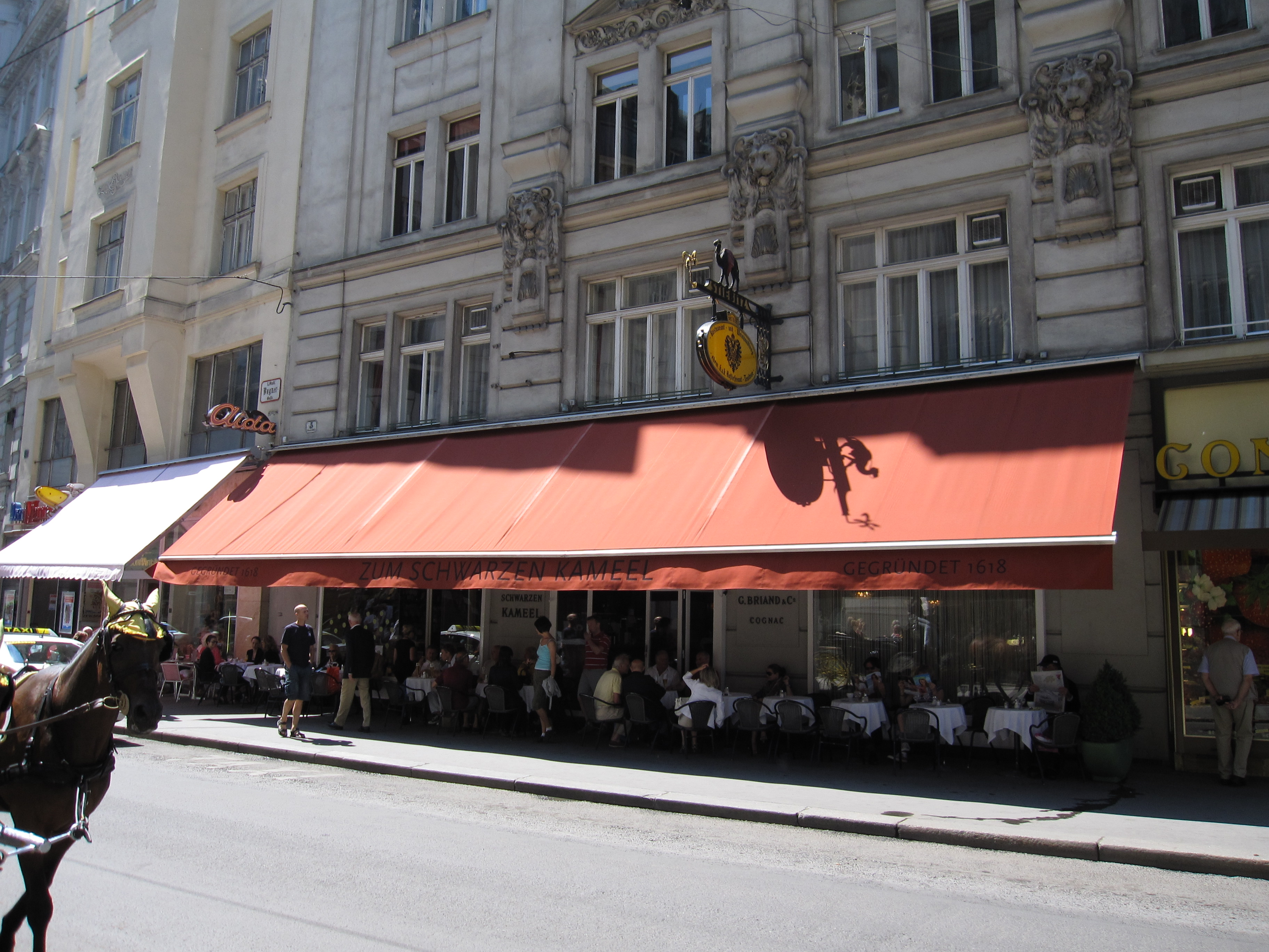 "Zum Schwarzen Kameel" in Vienna's I. district